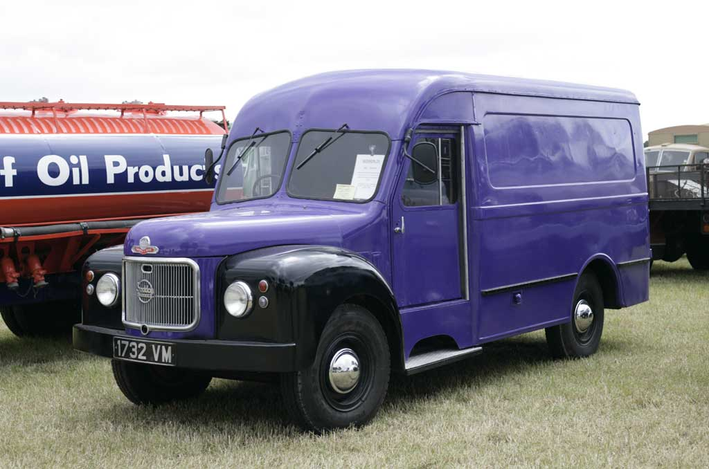 1957 Seddon 25 Van